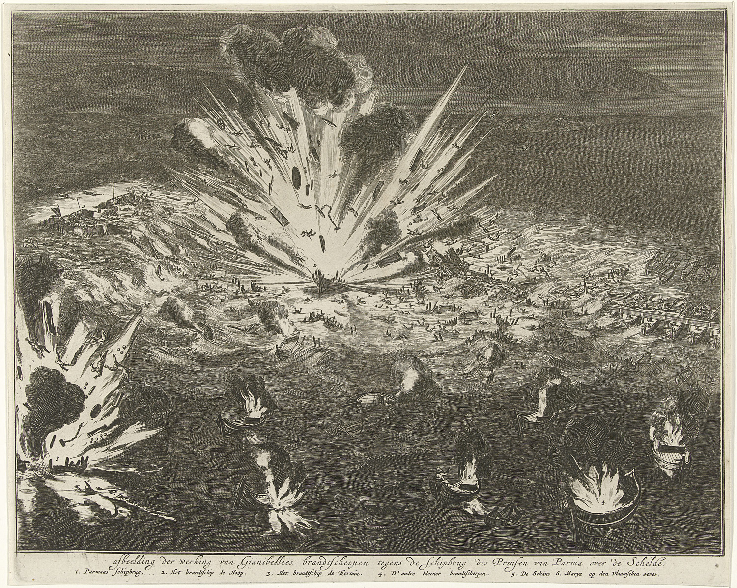 Parma's bridge in Antwerp 1586